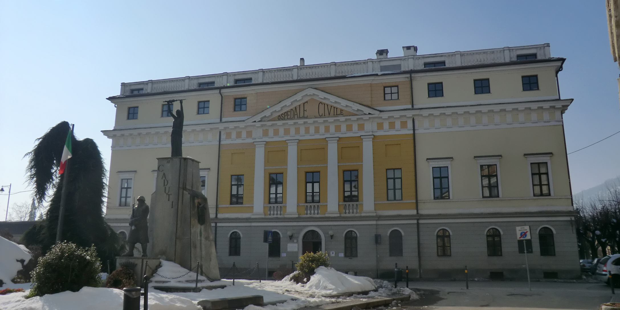 Busca (Cuneo): ospedale civico (XVIII sec.)